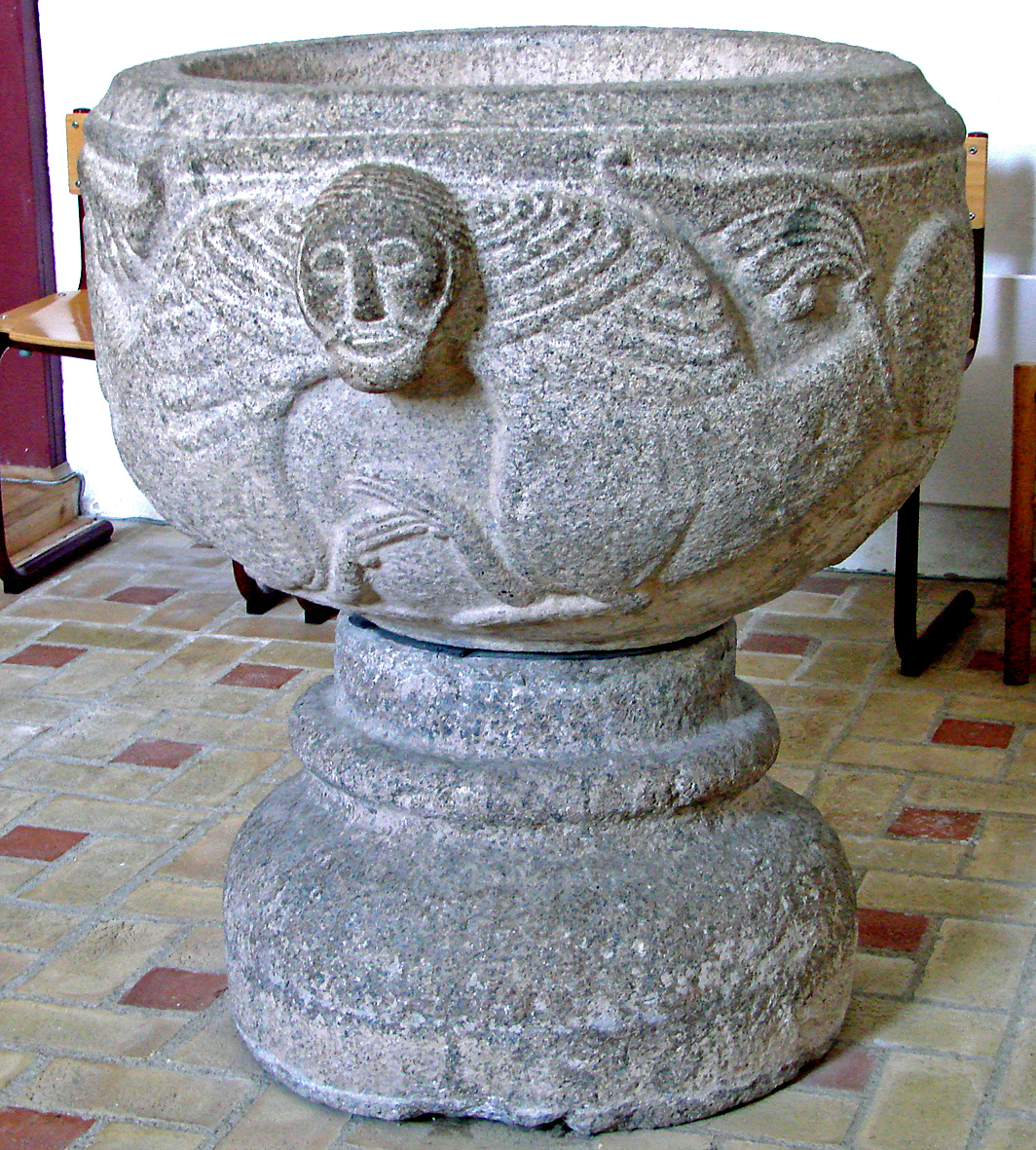 Døbefont Malling Kirke Jylland, Denmark